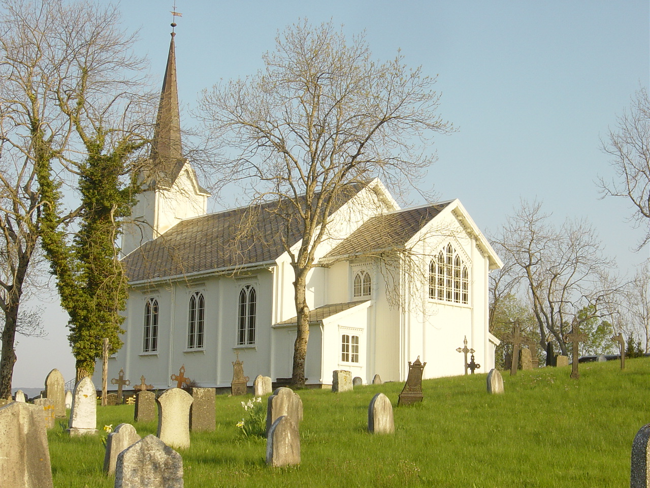 Gjemnes kirke, Gjemnes in Møre og Romsdal, Norway.